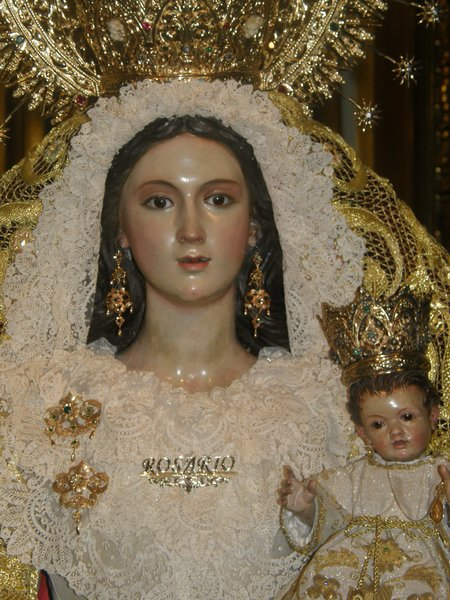 Virgen del Rosario Patrona de Brenes.